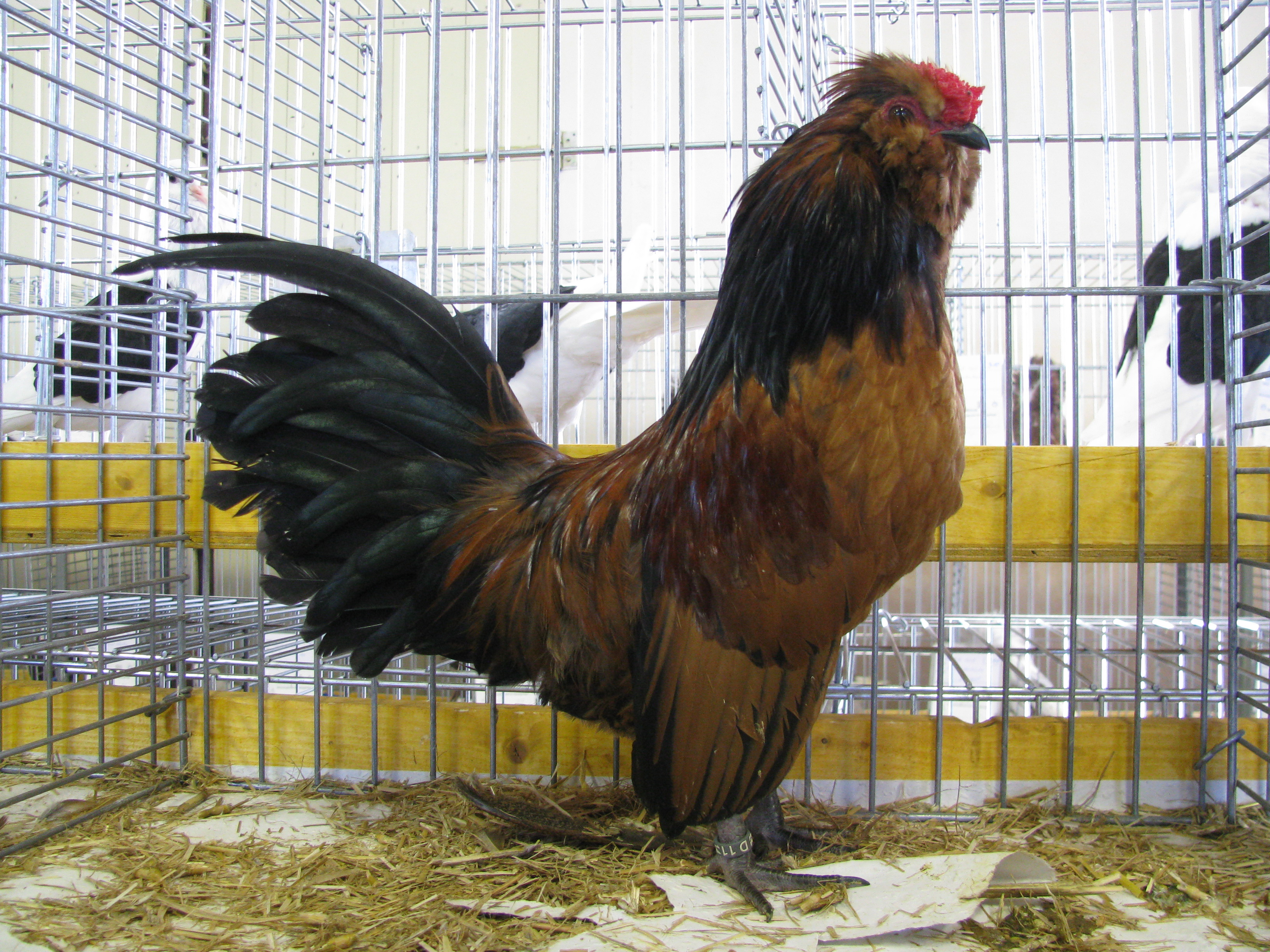 RGZV Frankenthal e.V. – Lokalschau in der Turnhalle Frankenthal vom 22. bis 23. November 2014 1,0 Watermaalsche Bartzwerge, wachtelfarbig, sg94